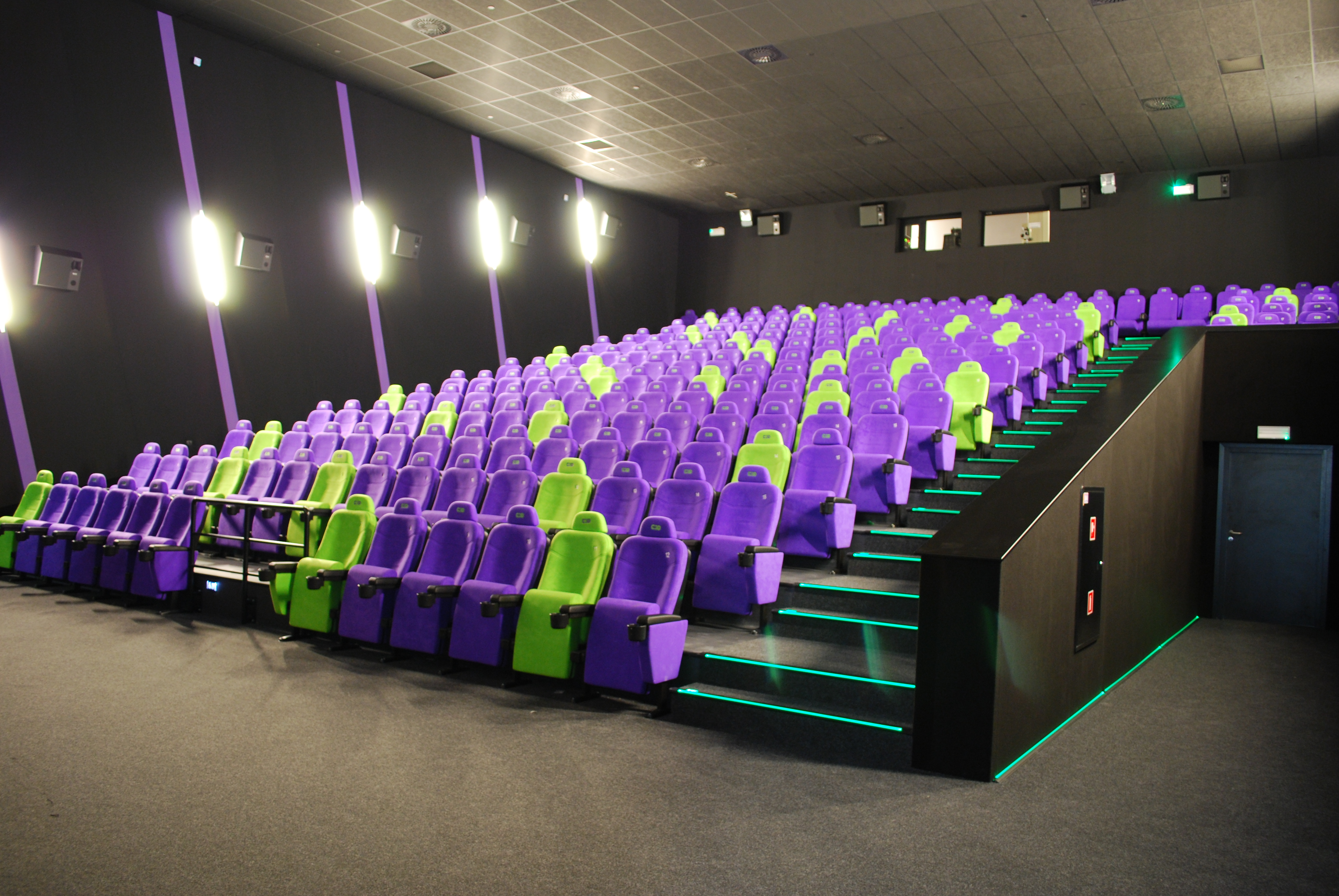 sala kinowa w kinie w Kaliszu w sieci Cinema 3D